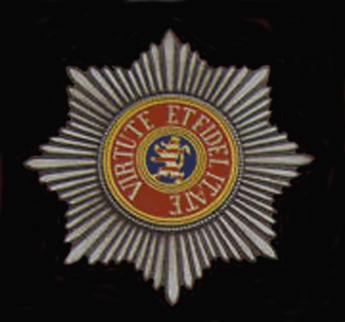 Stern des Ordens vom Goldenen Löwen von Hessen-Kassel